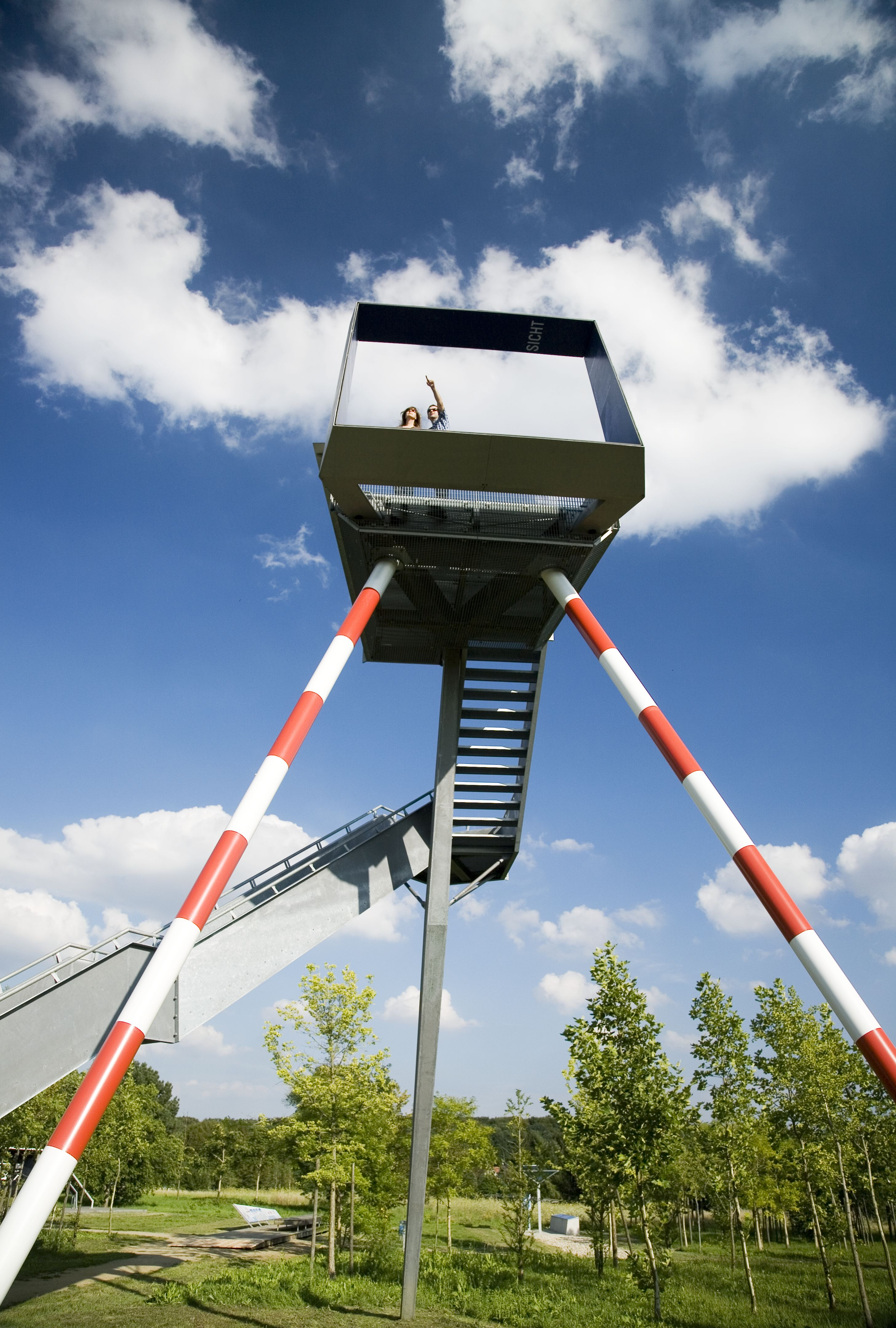 Der Wetterpark ist ein frei zugänglicher Erlebnisparcours. Wetterphänomene werden anschaulich erläutert; Buchhügelallee 400